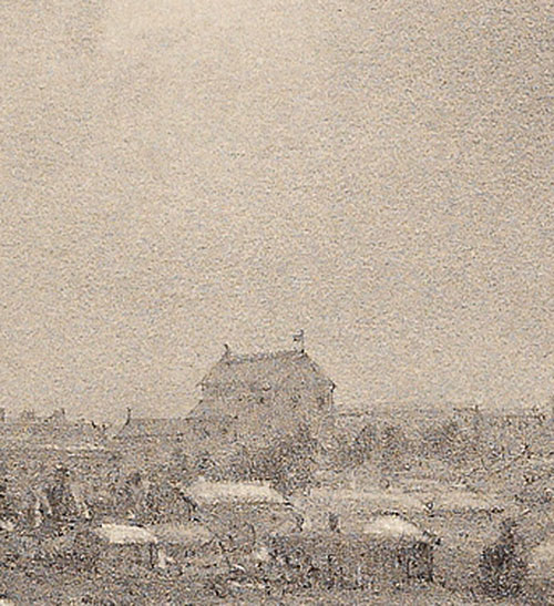 Беларуская (тарашкевіца): Менск (Miensk), Цёмныя Крамы (Ciomnyja Kramy). Касьцёл Сьвятога Яна і кляштар баніфратаў